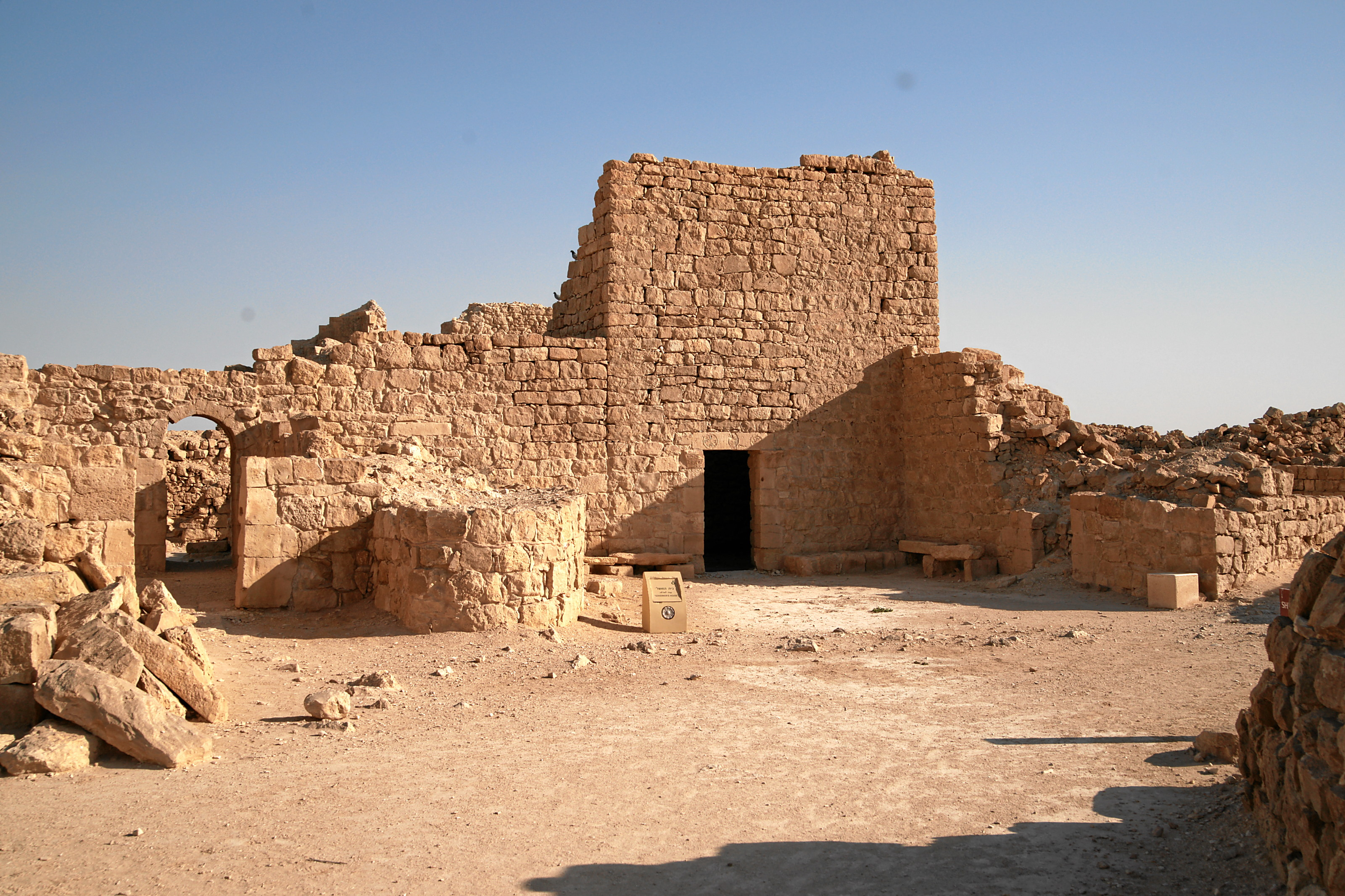 Shivta: Turm des Governor's House